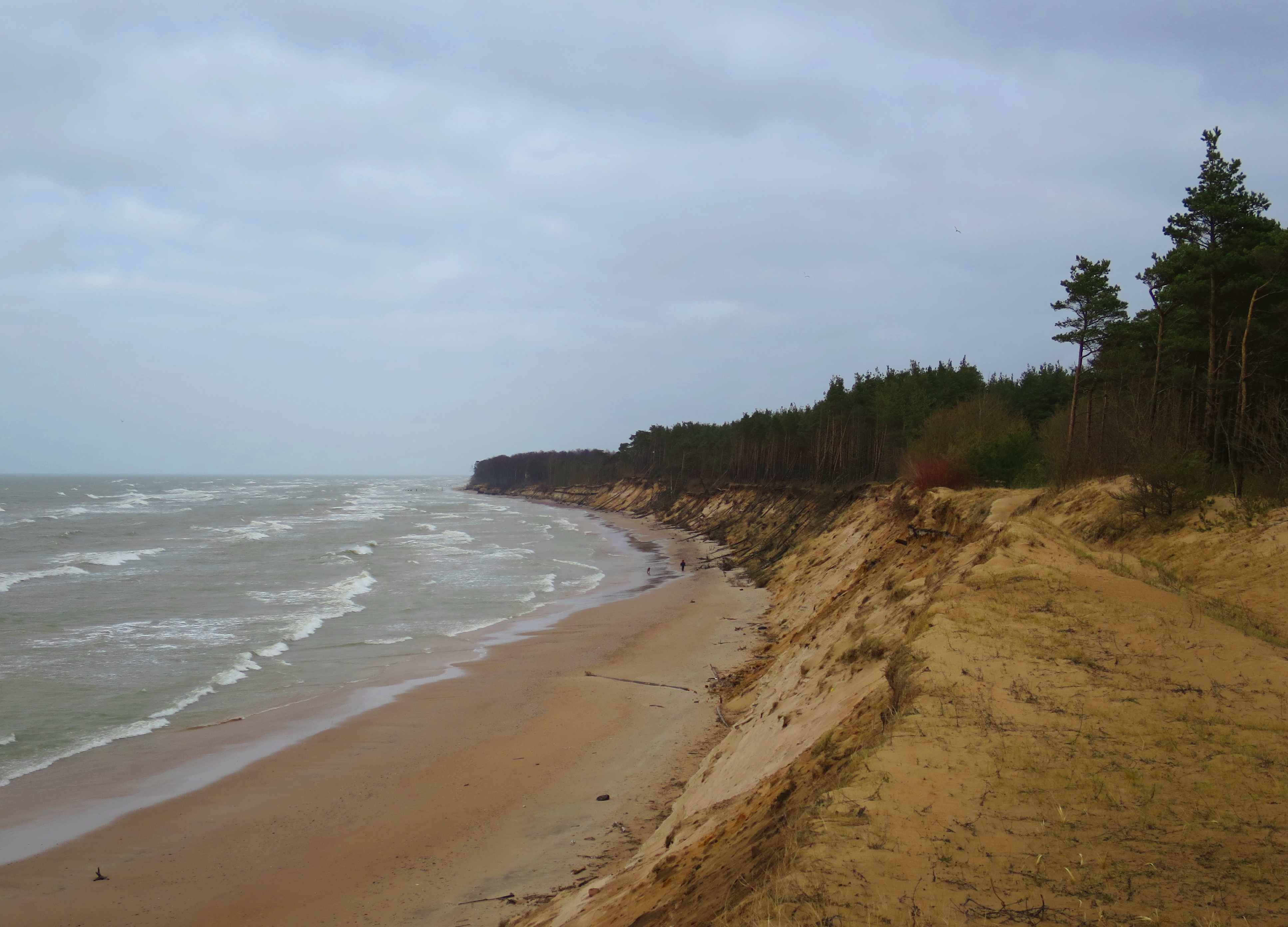 Staldzenes stāvkrasts